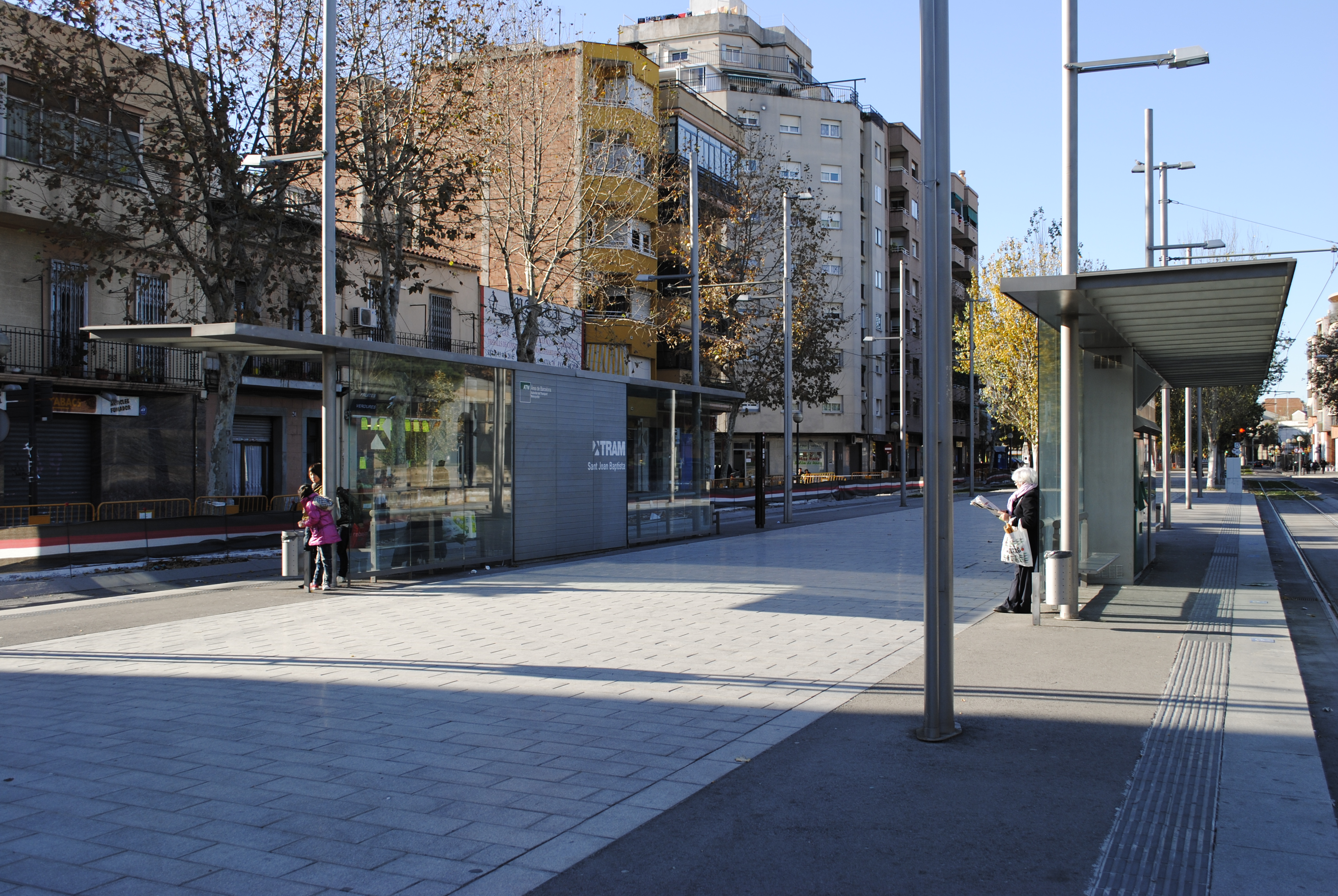 Parada de l'estació de Trambesòs Sant Joan Baptista